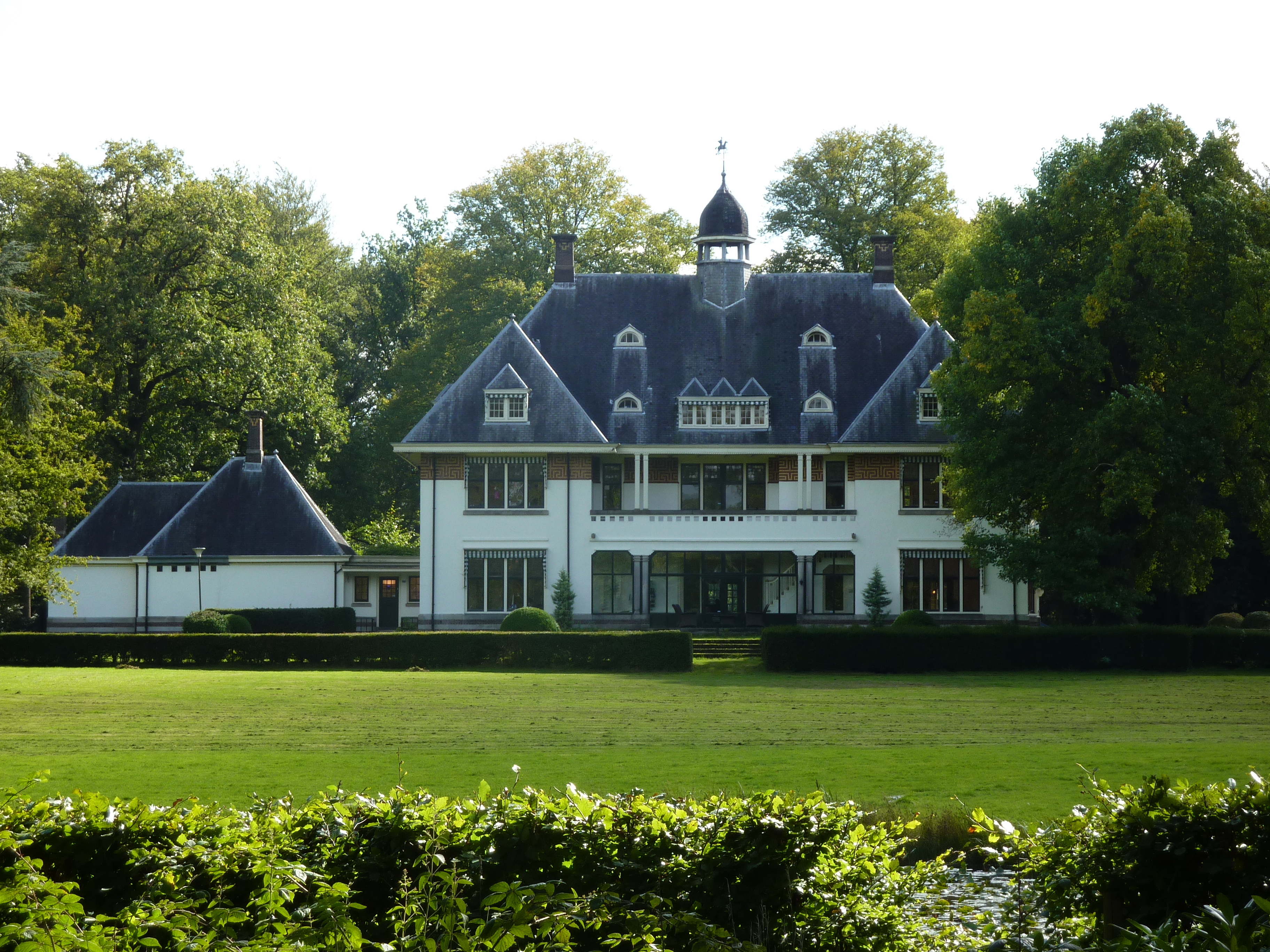 Landhuis Stokhorst gefotograveerd vanaf de Oldenzaalsestraat